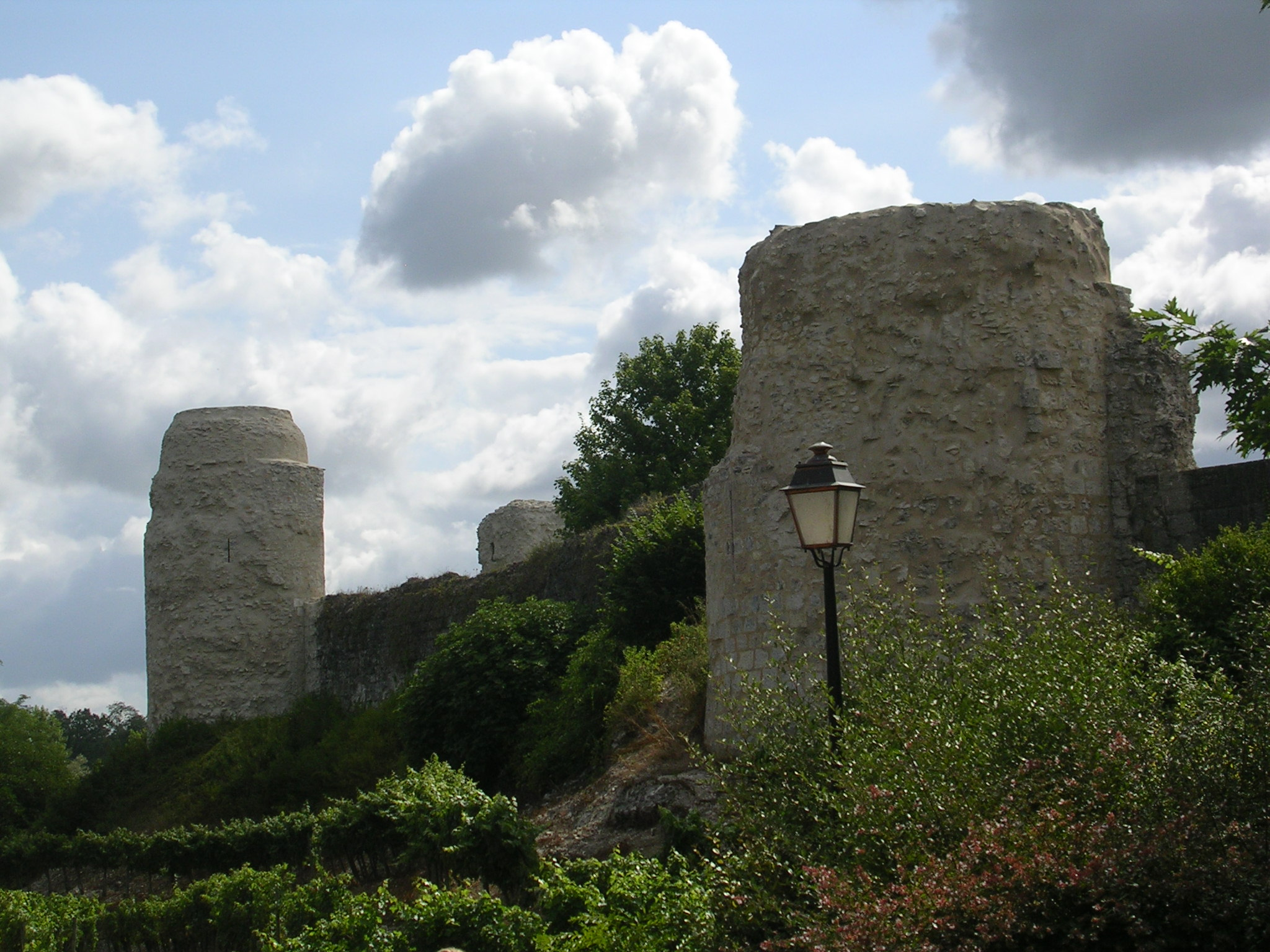 Château de Bellocq